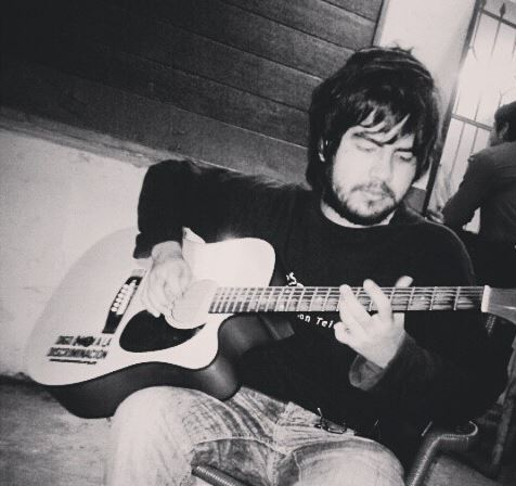 Victor Vera Tocando la Guitarra